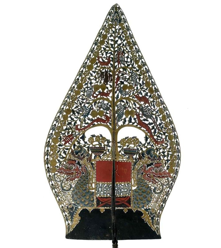 Schaduwfiguur. Wajangfiguur met twee slangen, dat als pauzefiguur fungeert Unknown language: Wayang kulit purwa; Gunungan Blumbangan of Kayon